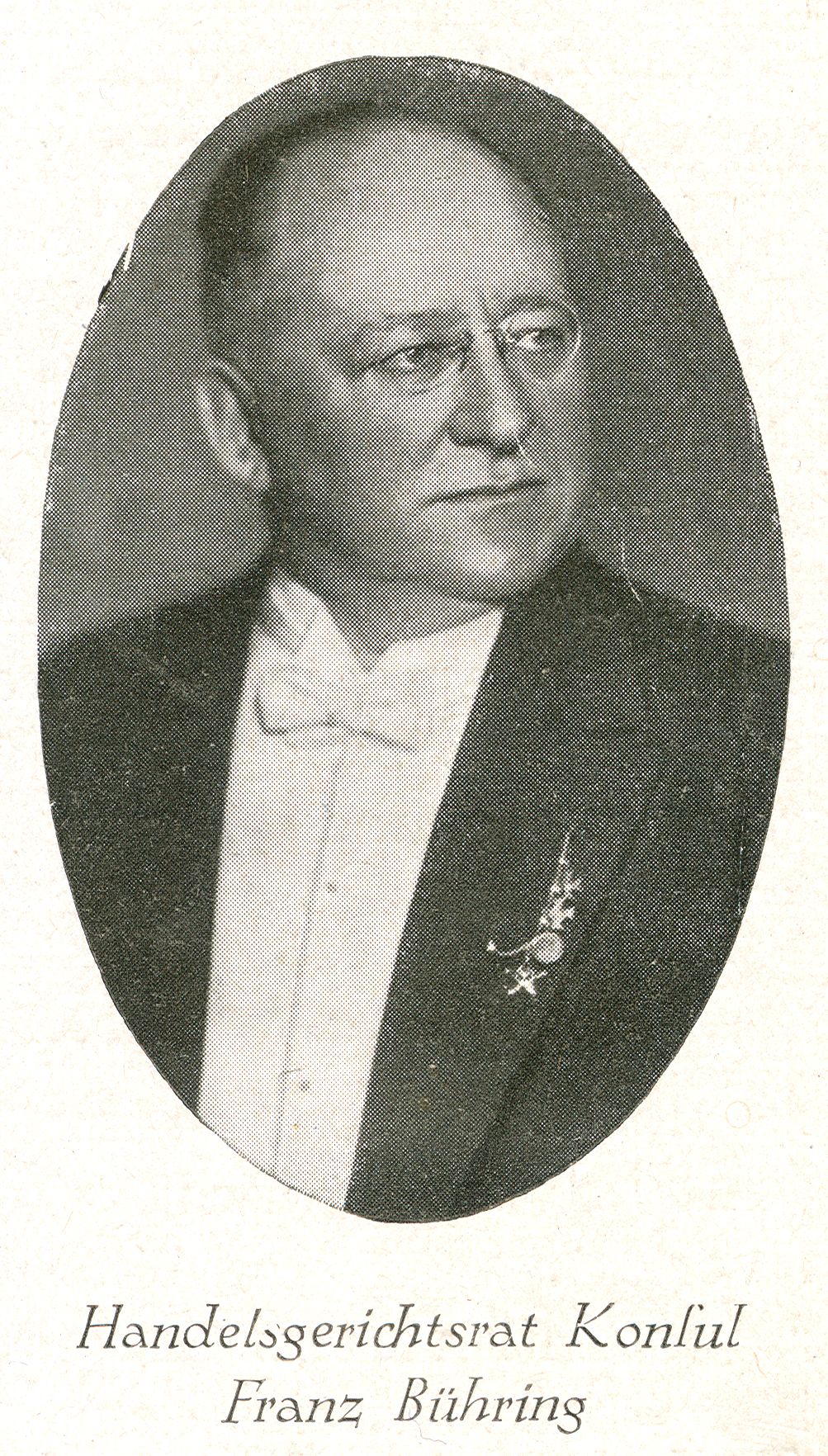 Franz Bühring (geboren 22. März 1868 in Hannover; gestorben 24. Juli 1941 ebenda) war der Sohn von Conrad Bühring, Textilfabrikant, Wirtschaftsführer und seit 1927 Türkischer Konsul ...